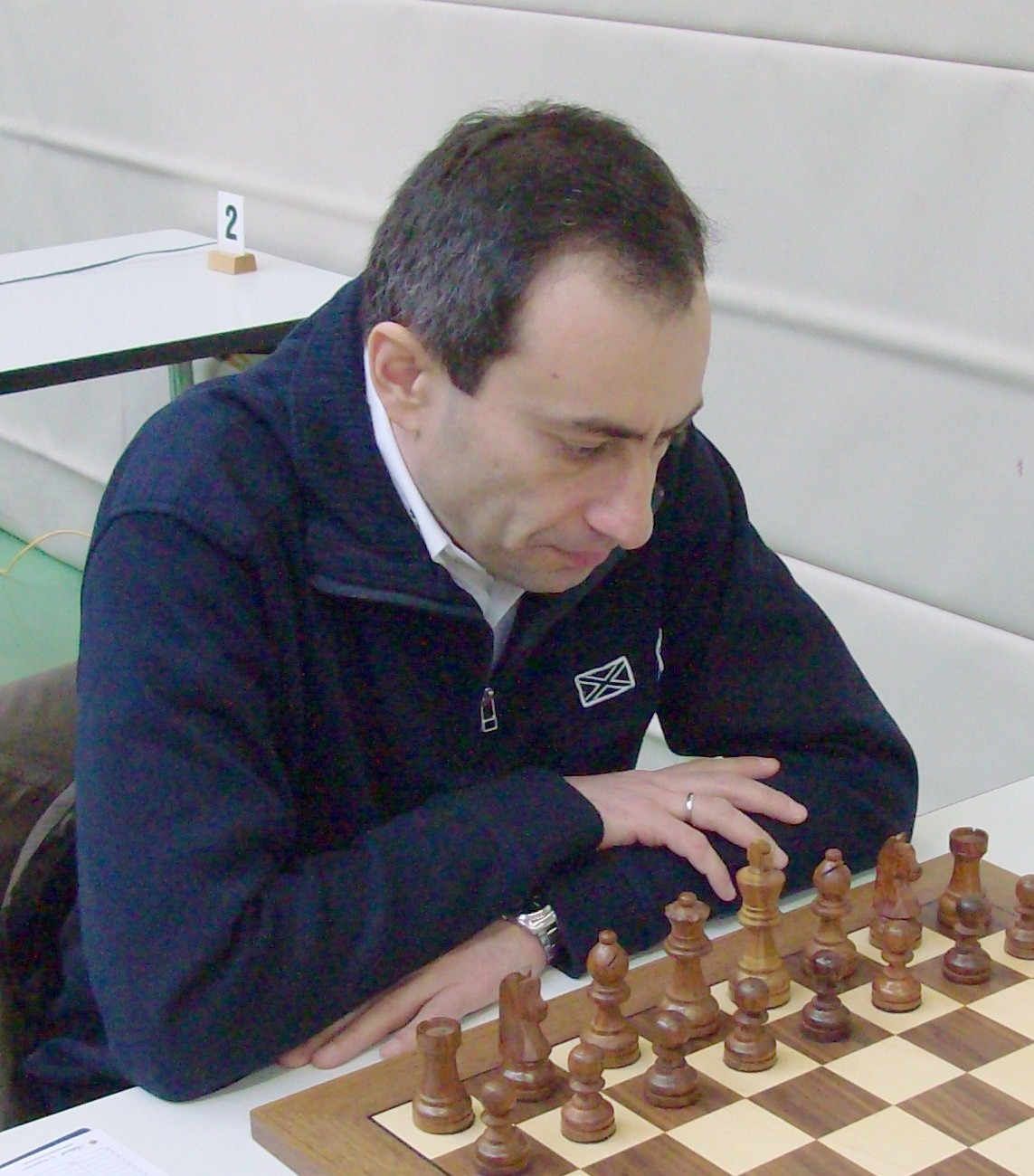 Alexander Berelovich, chess grandmaster from Ukraine